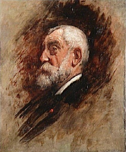 Portrait de Henri Harpignies